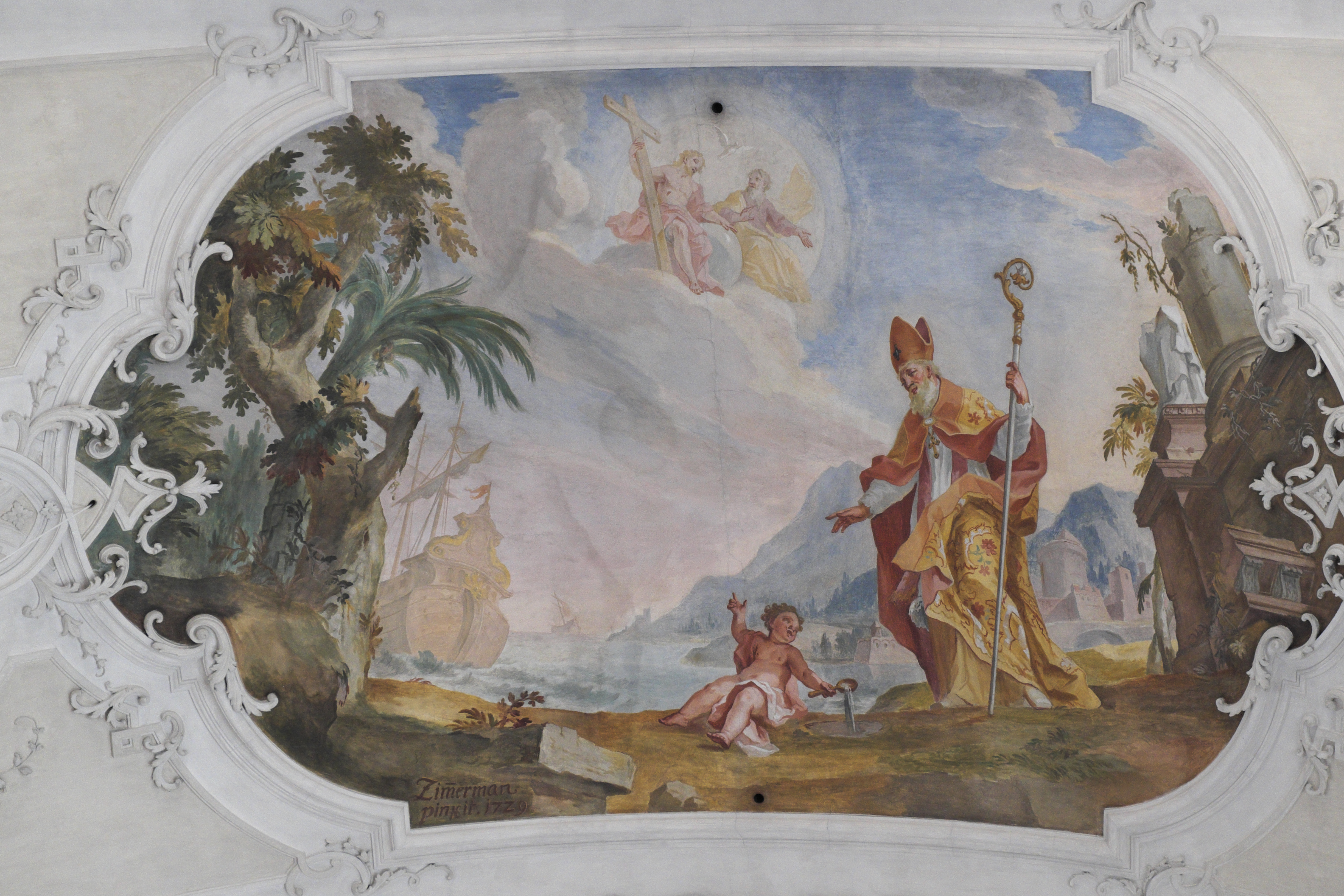 Ehemalige Augustinerchorherrenstiftskirche St. Peter und Paul in Weyarn im Landkreis Miesbach (Bayern/Deutschland), Fresken von Johann Baptist Zimmermann, von 1729; mit der Signatur: Zimerman pinxit, 1729; Darstellung: Augustinus und ein Knabe, der mit einem Löffel Wasser aus dem Meer schöpft